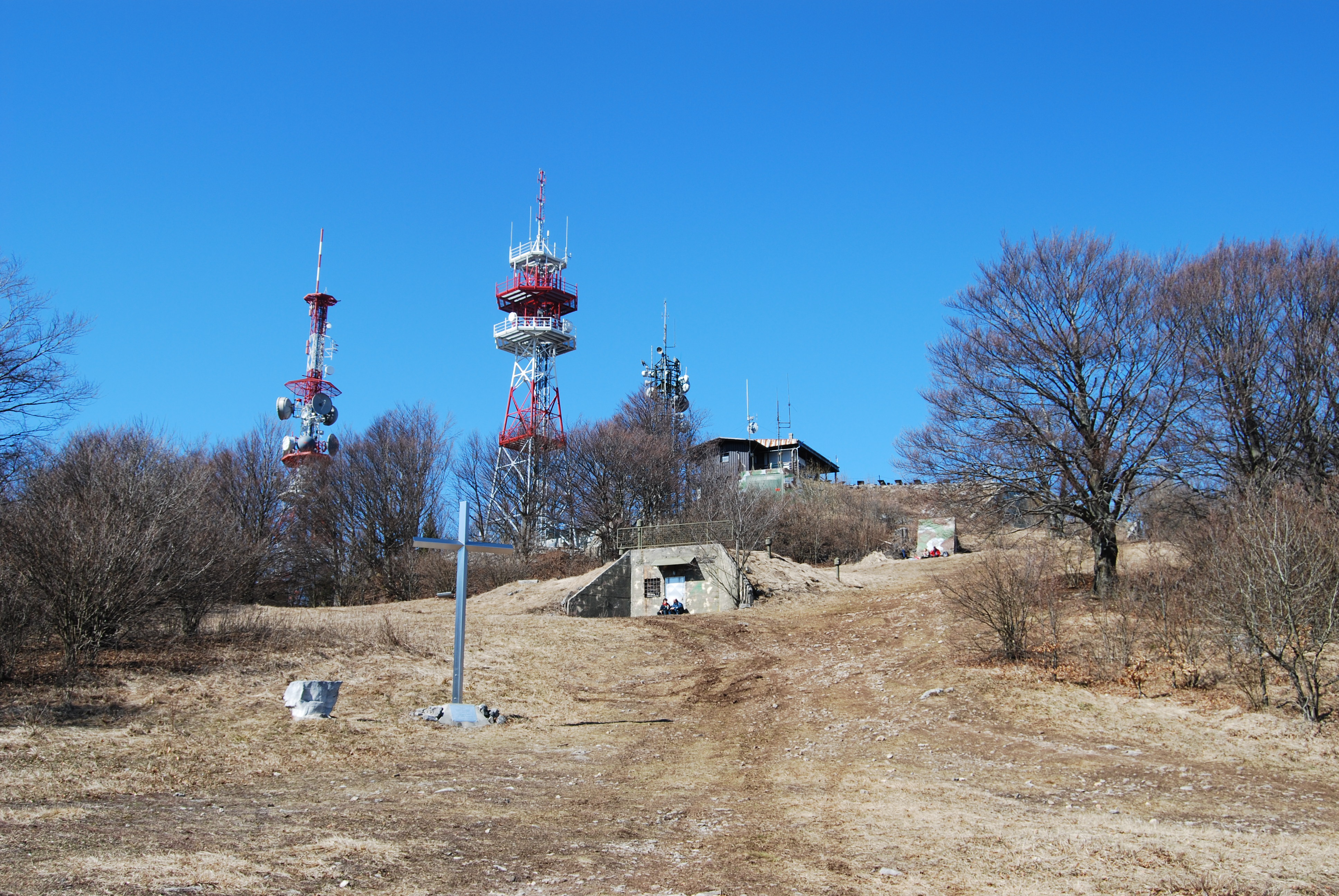 Na vrhu Krima se nahajajo trije radijski stolpi; RTV, MNZ in MORS.